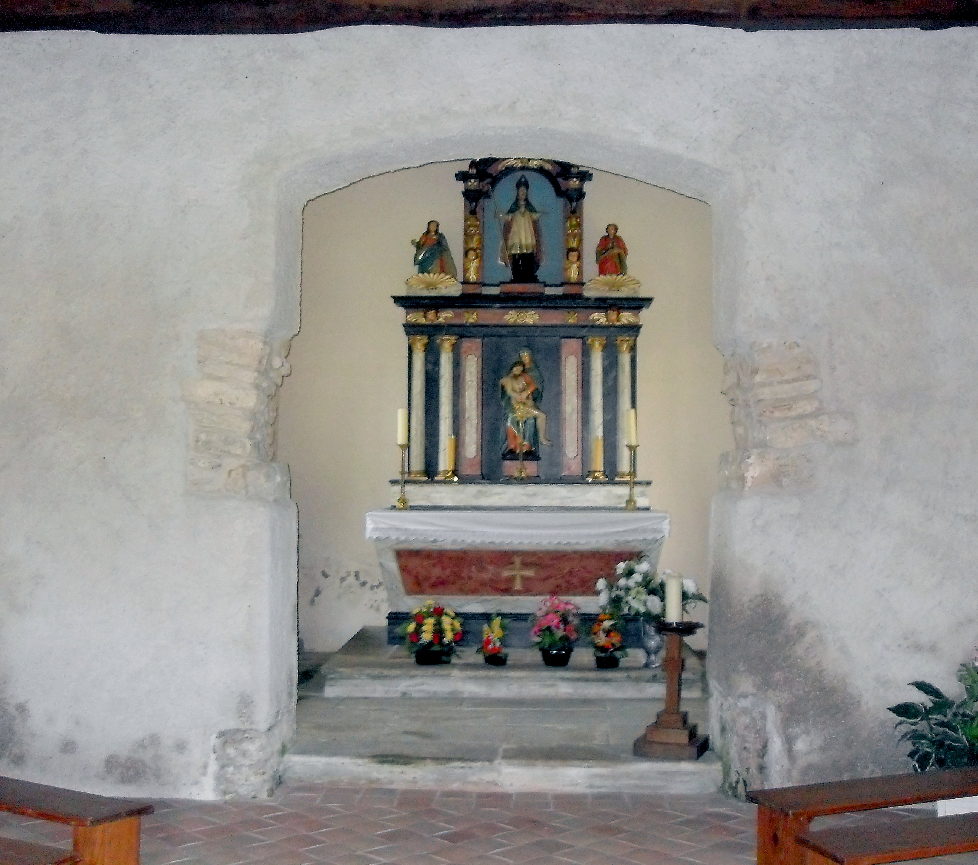 La chapelle Saint-Brice à Hausgauen